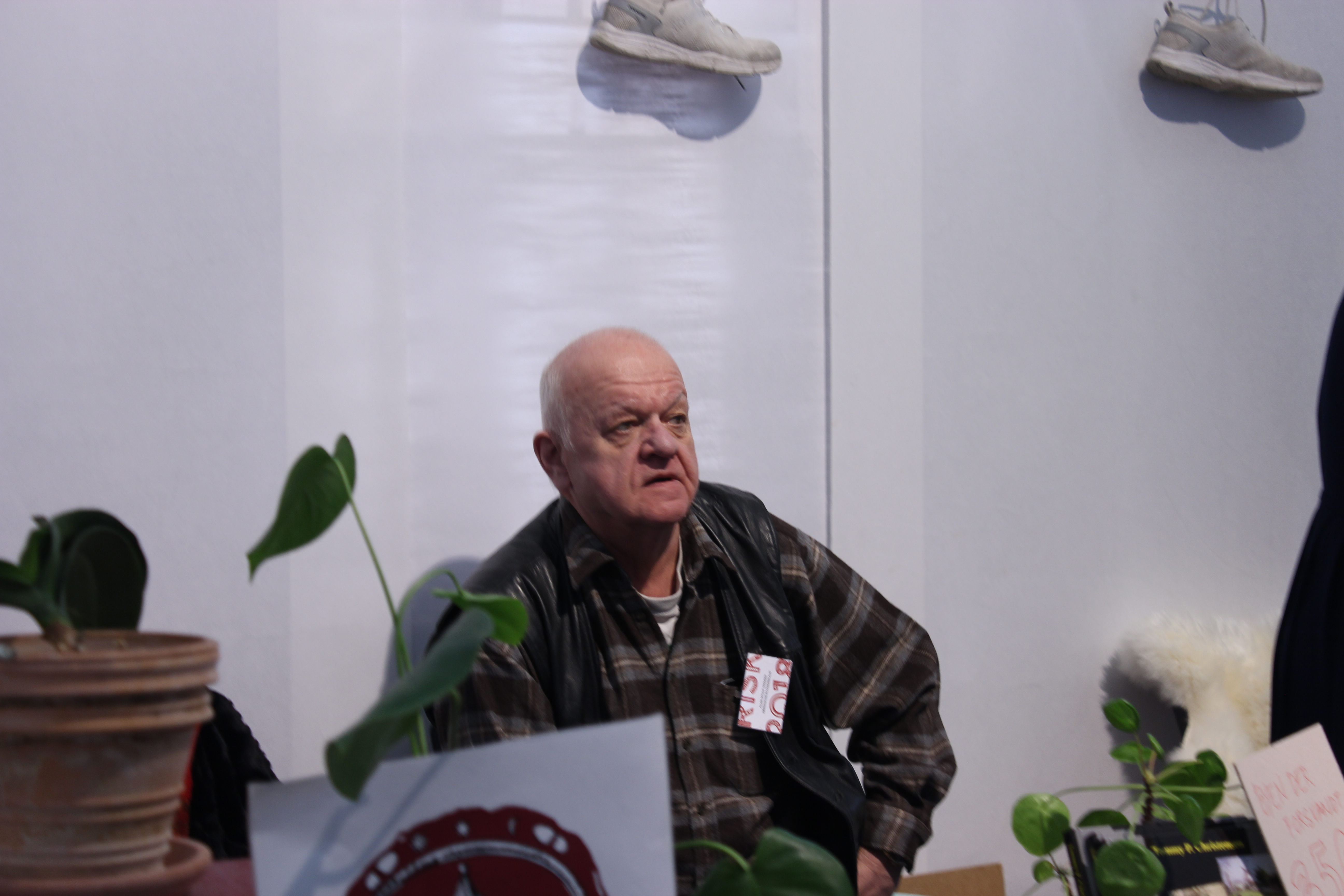 Den danske historiker Allan Mylius Thomsen til Historiske Dage 2018